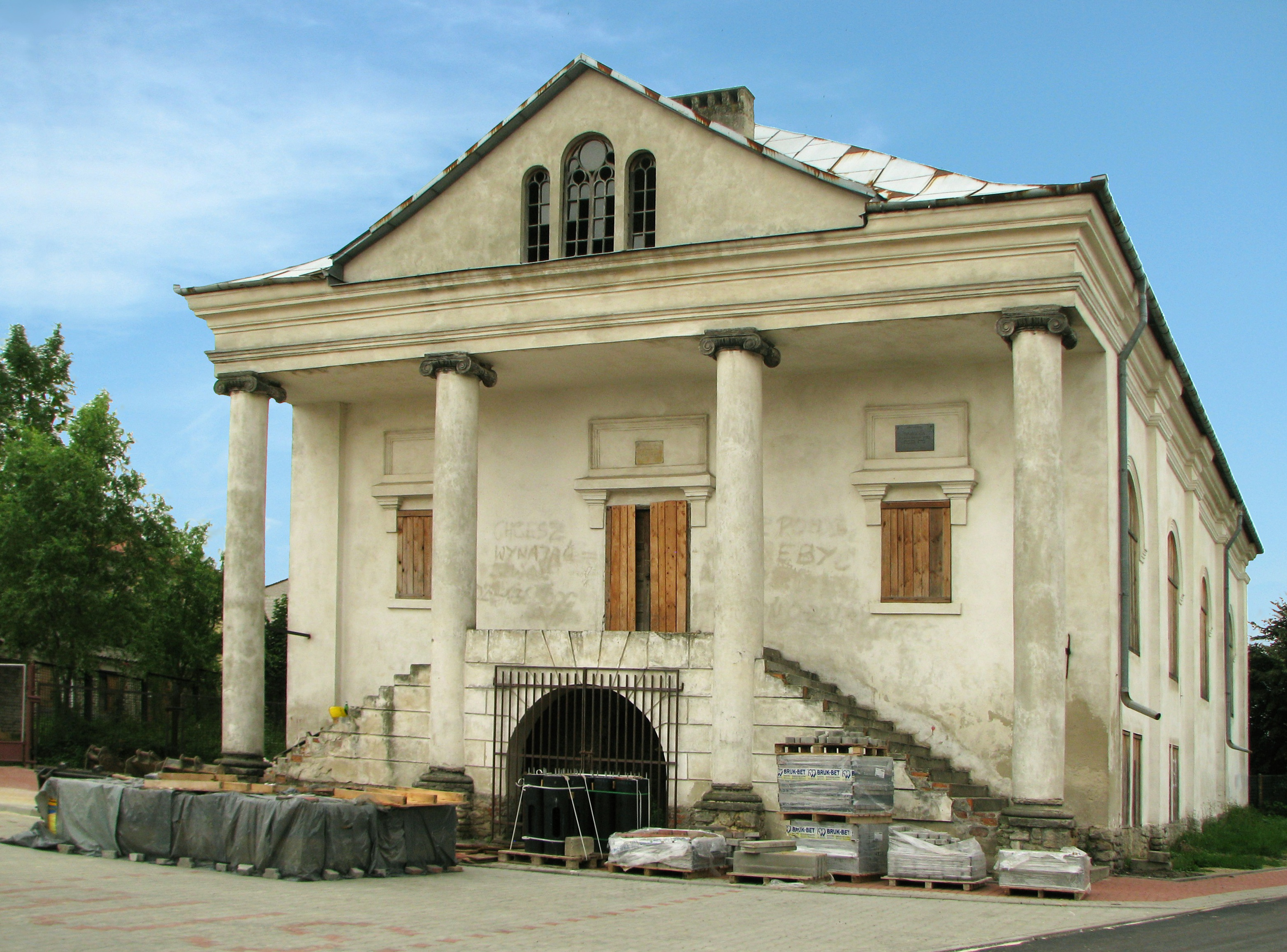 Synagoga w Klimontowie w 2011 r. Zabytek prawnie chroniony.